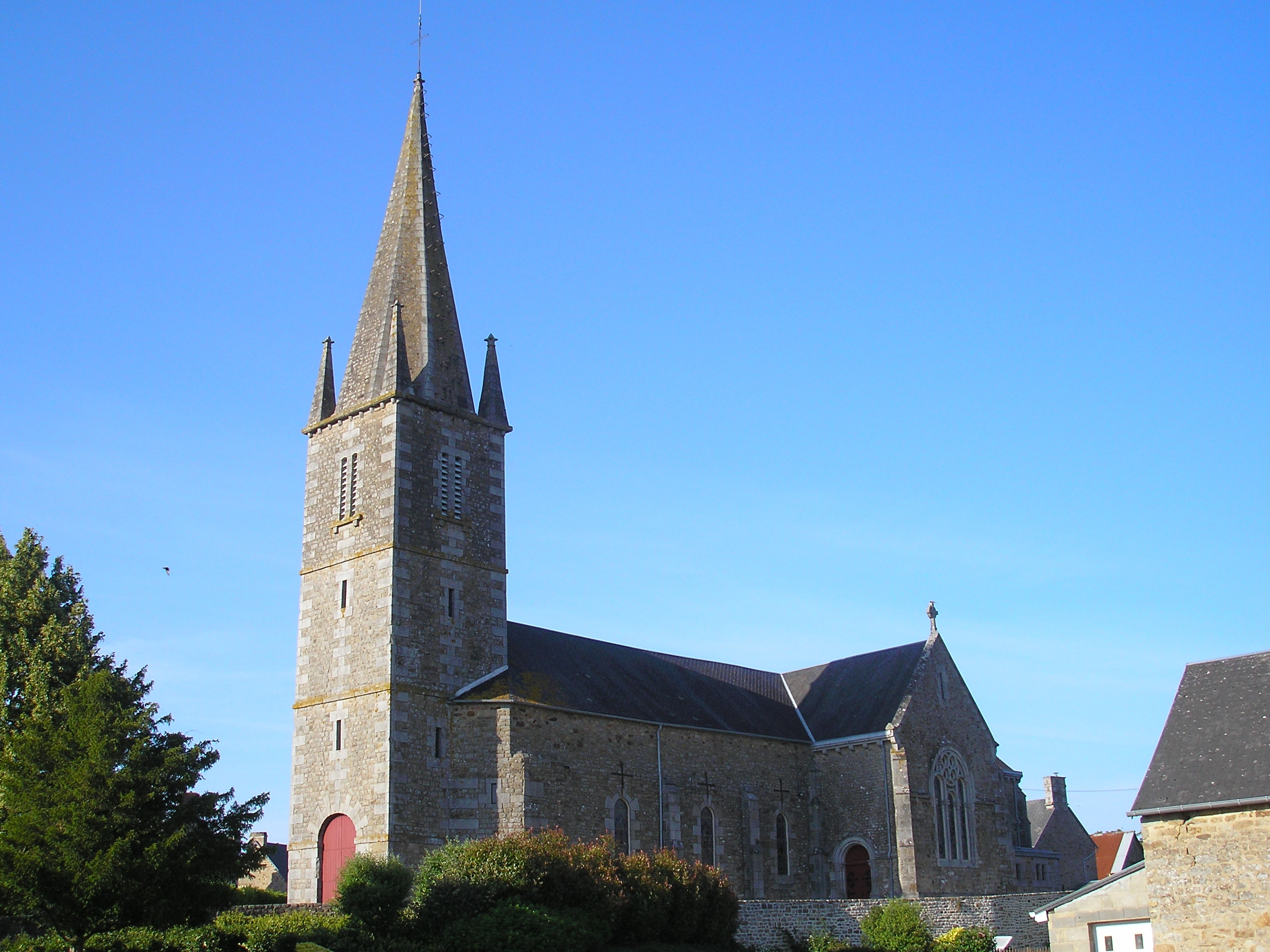 Marcilly (Normandie, France). L'église Saint-Martin.